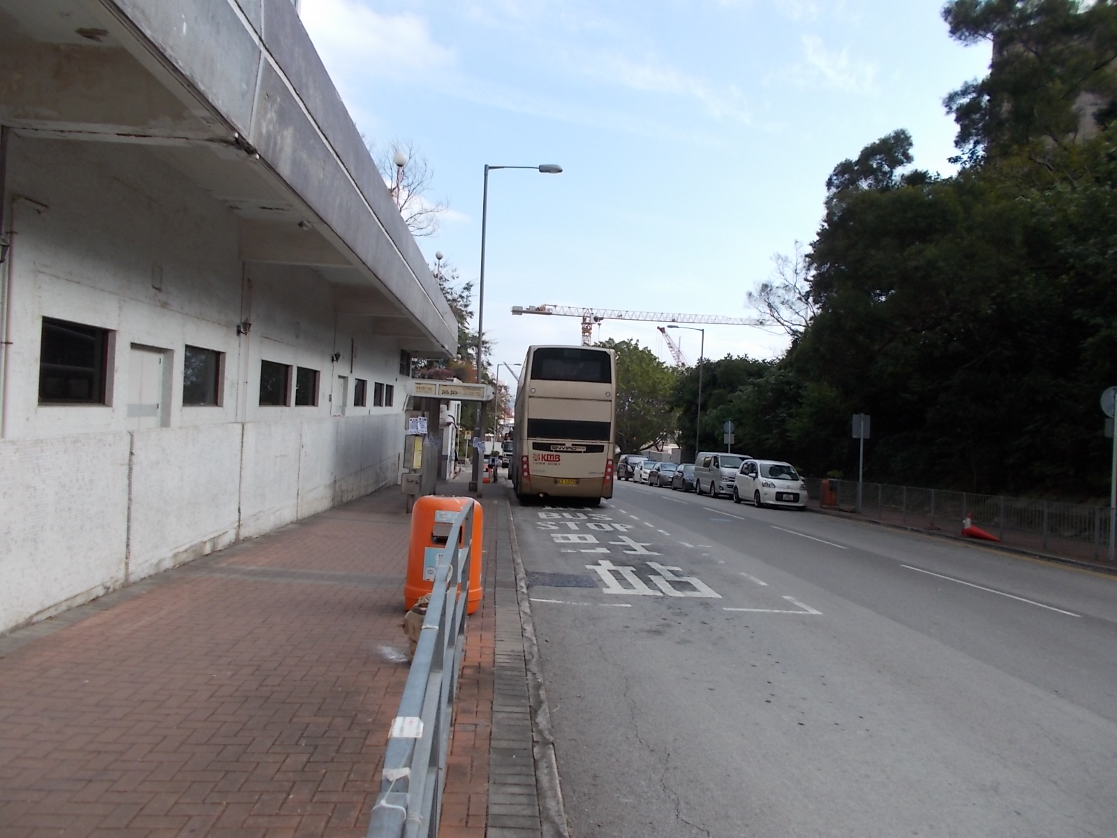 美景花園巴士總站(2020年)